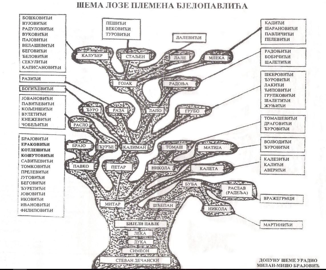 Шема лозе племена Бјелопавлићи